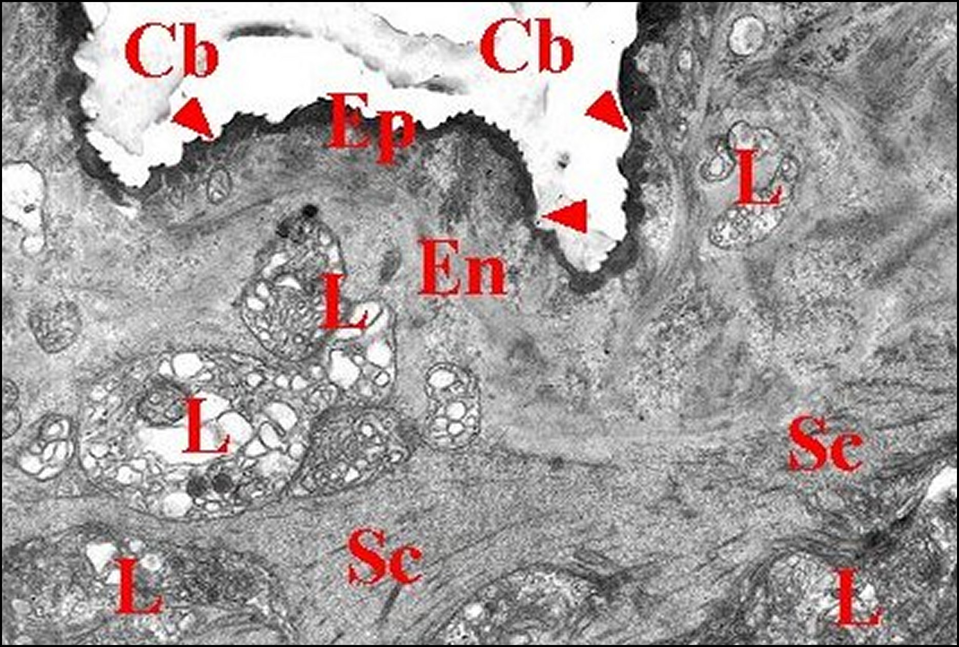 Argyrodes argyrodes : cuticule et épithélium de la chambre de la glande rostrale. Microscopie électronique à transmission